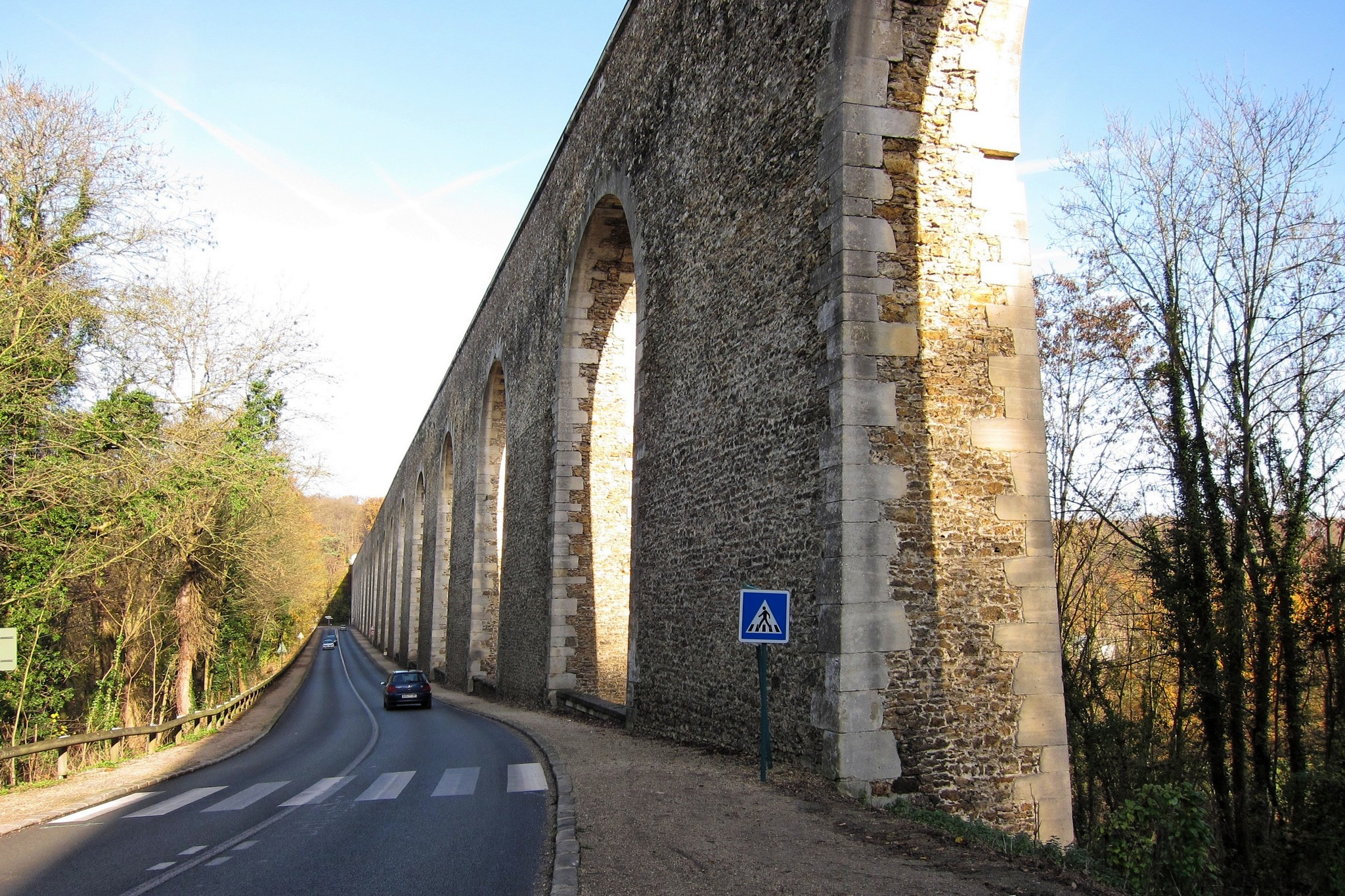 "Construit entre 1684 et 1686, il faisait partie des aménagements hydrauliques destinés à acheminer de l'eau pour alimenter les fontaines et les jets du parc du château de Versailles. Il est classé au titre des Monuments historiques."